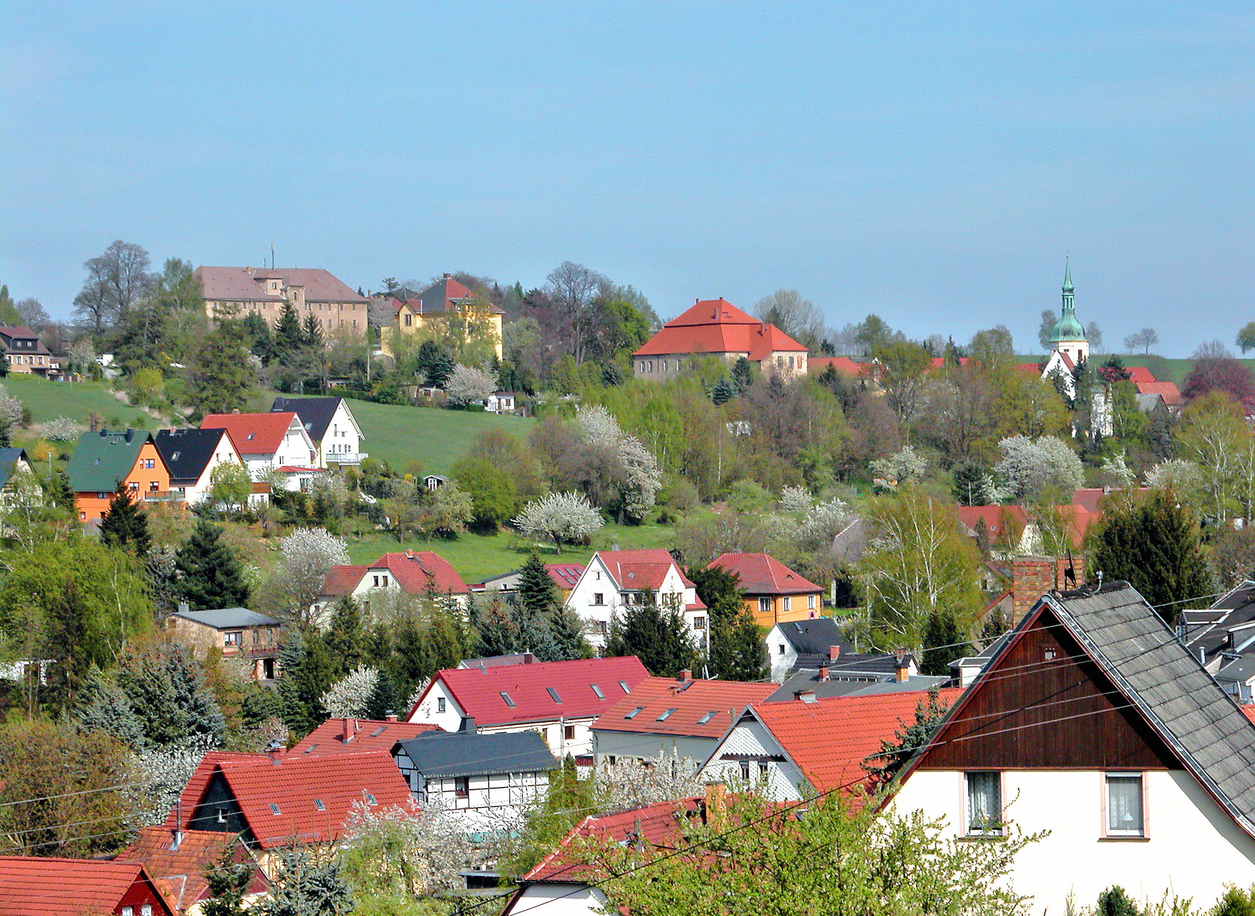 21.04.2007 01796 Struppen: Blick von Neustruppen nach Kleinstruppen mit Kadettenanstalt, Schule, Schloß und Kirche. [DSCN22069.TIF]20070421305.JPG(c)Blobelt